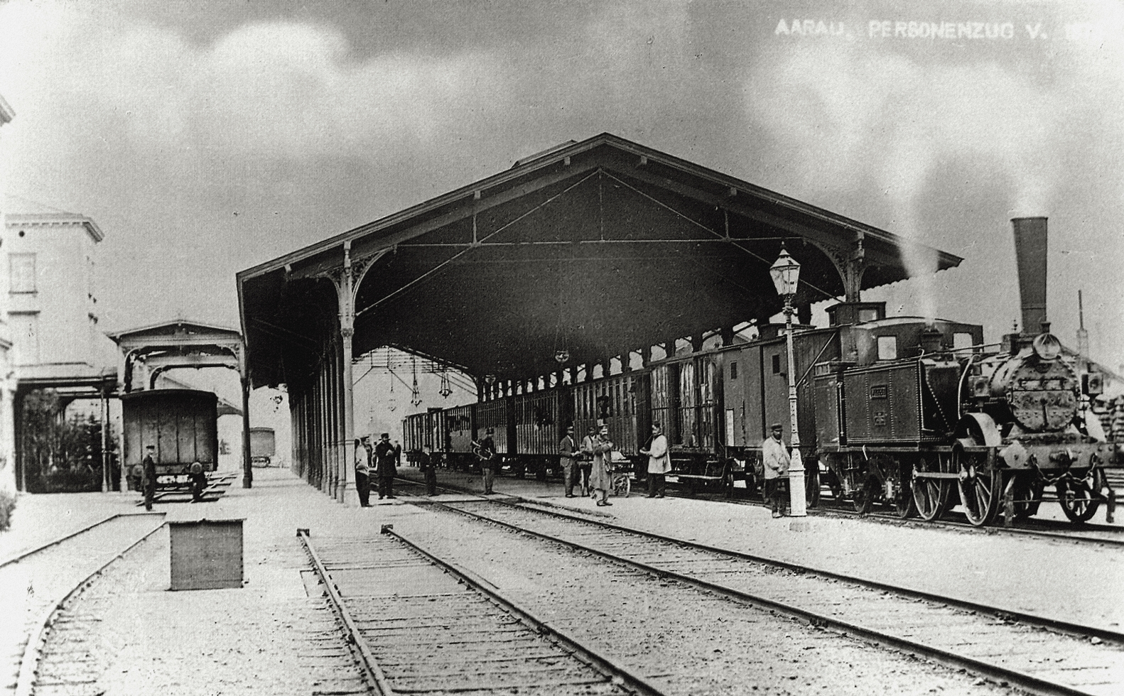 Bahnhof Aarau mit einem bereit stehendem Zug der Schweizerischen Centralbahn (SCB) nach Olten, bespannt mit einer Engerth-Lokomotive der Serie A